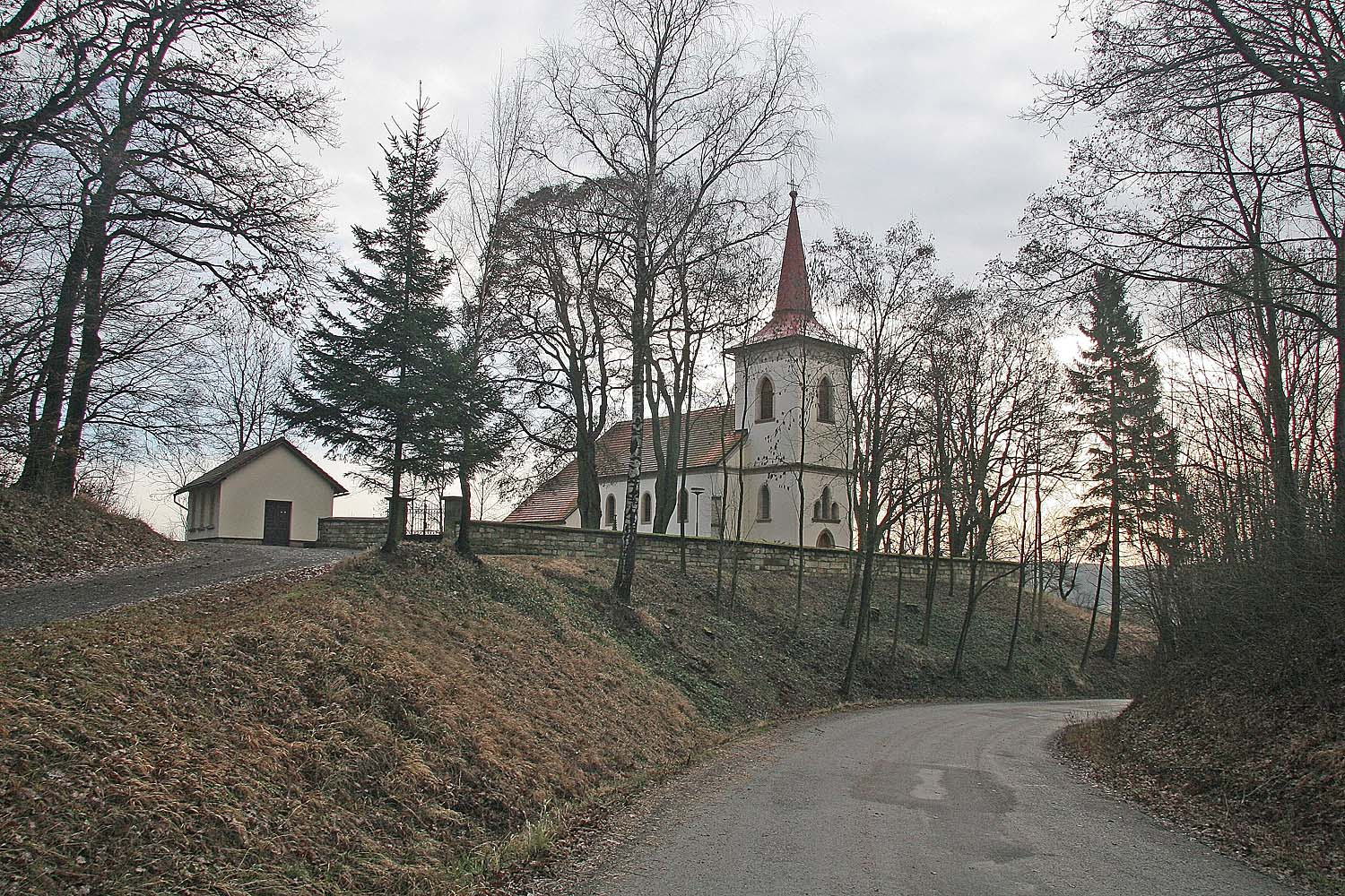 Červená Třemešná - kostel svatého Jakuba Většího, okres Jičín